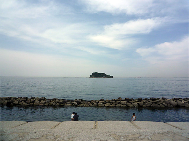 うみかぜ公園から眺める猿島。